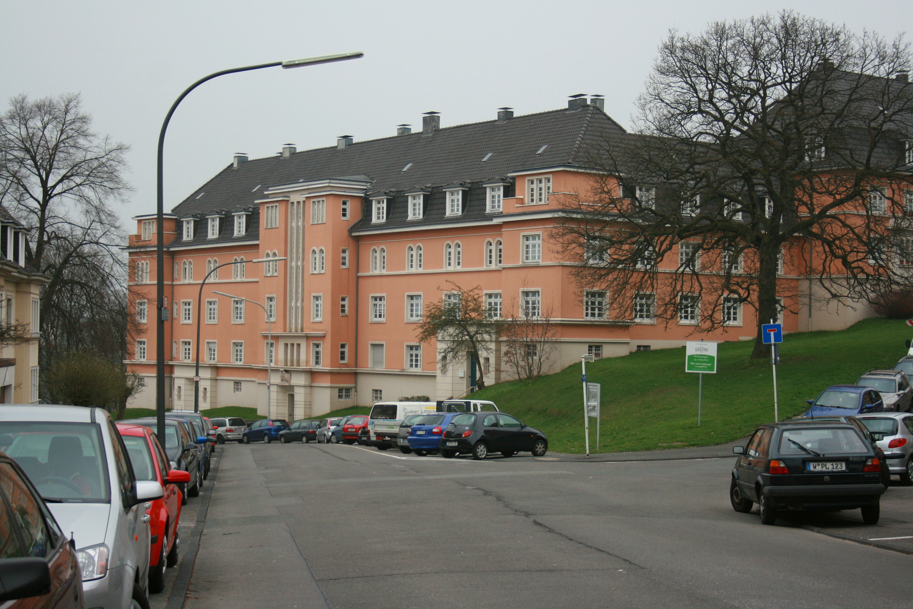 Siedlung Heimat in Wuppertal: Hindenburgstraße 29-31-33, rechts die Roebertstraße